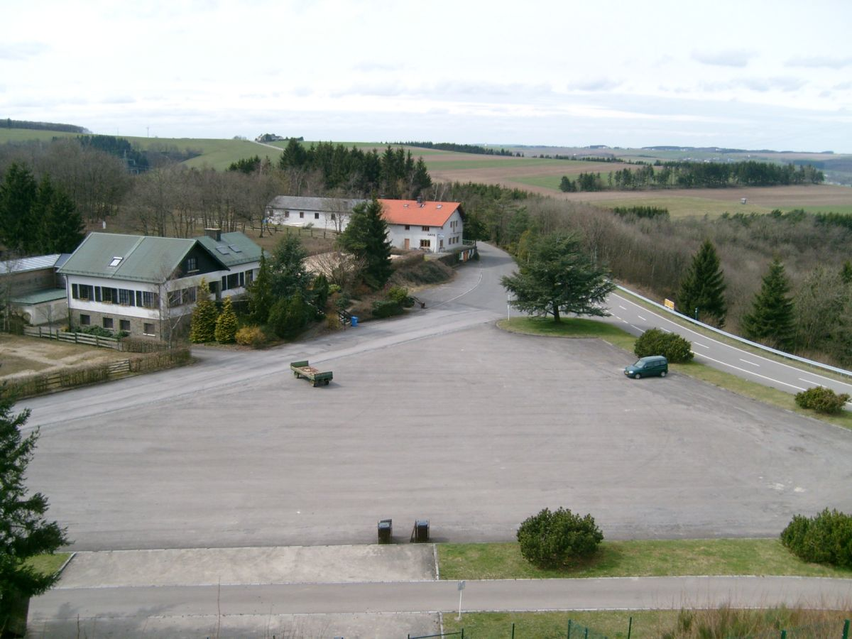 D'Uertschaft an de Parking um Niklosbierg. 01.04.2008